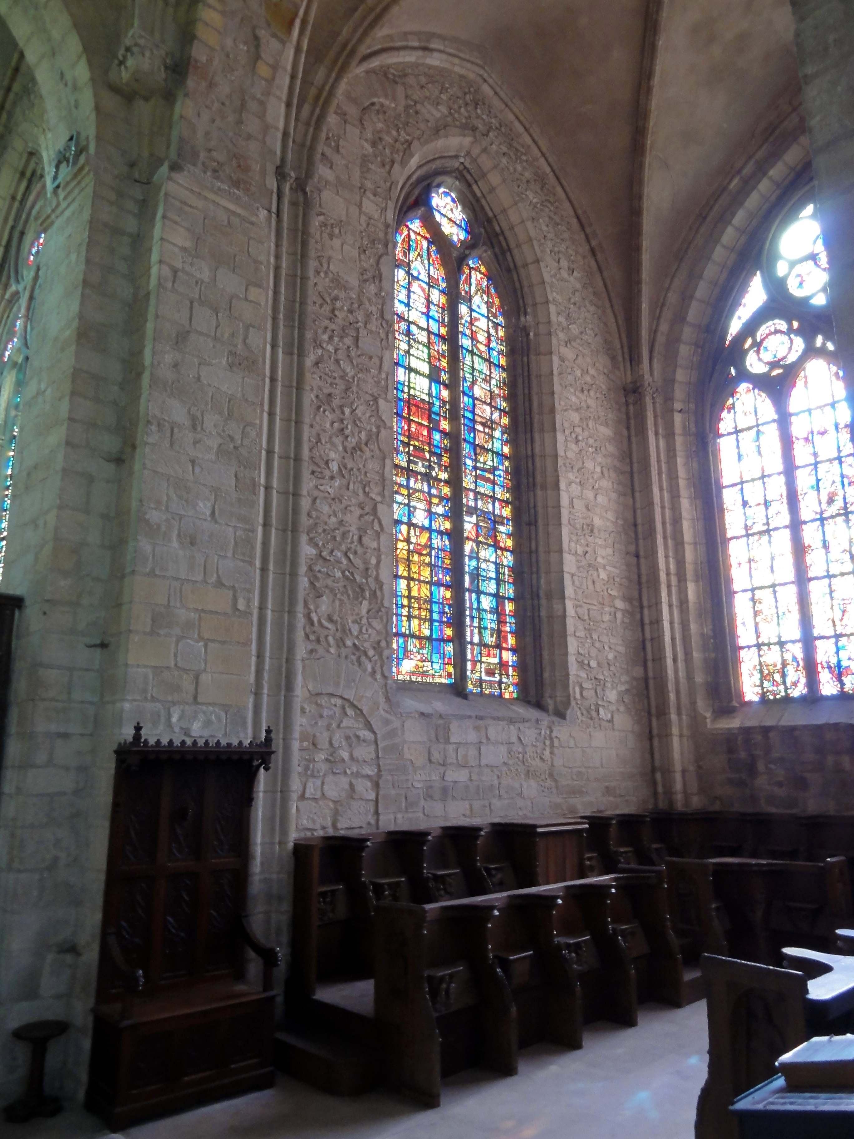 Intérieur de l'église (voir titre).